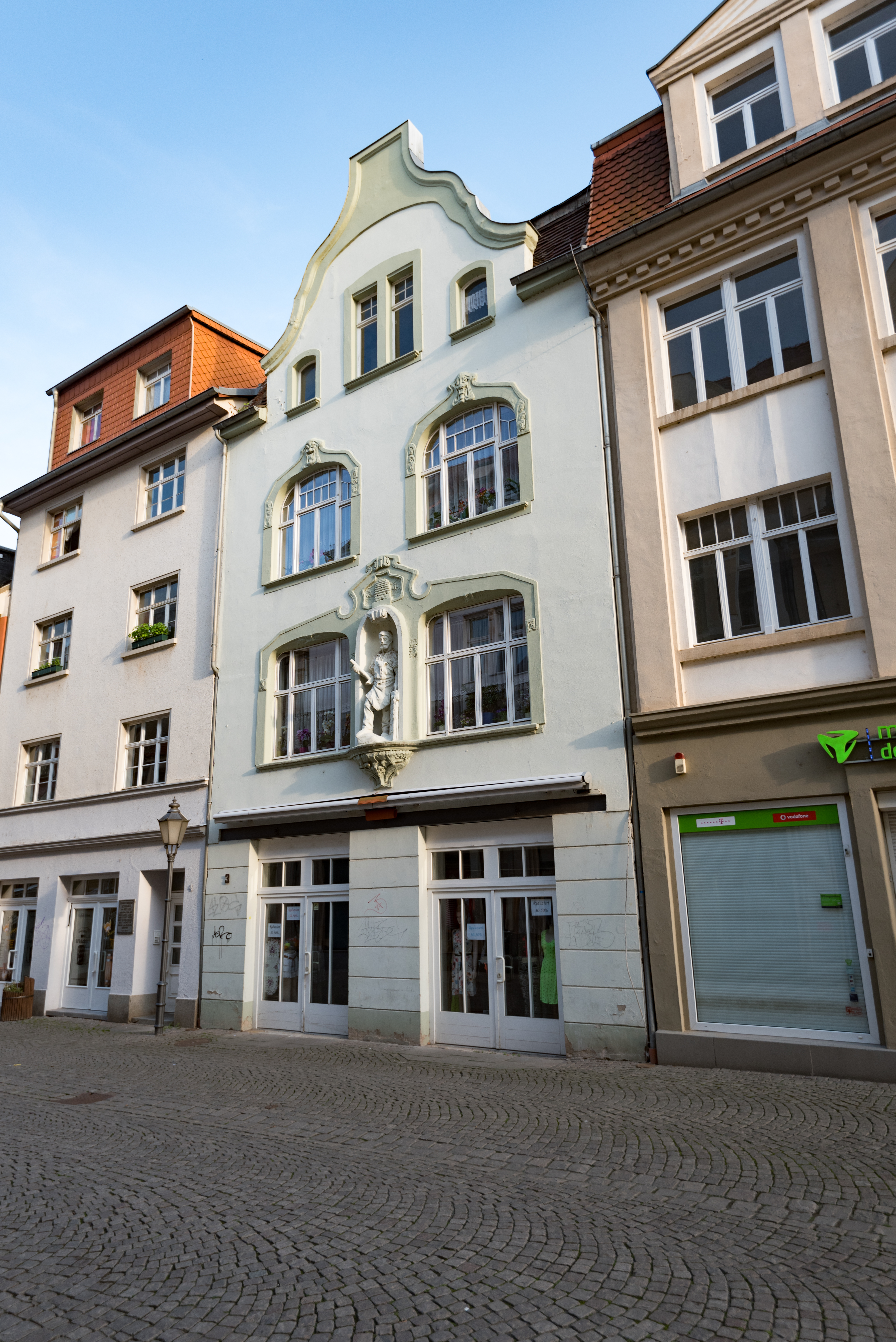 Zeitz, Wendische Straße 3